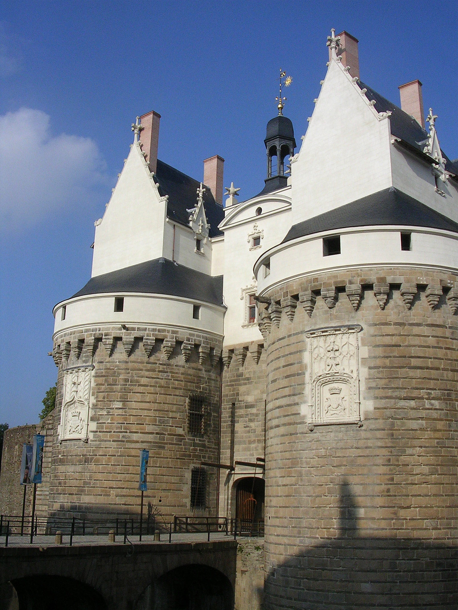 Château des ducs de Bretagne, entrée du pont dormant entre les tours du Pied-de-Biche & de la Boulangerie. Nantes (France)